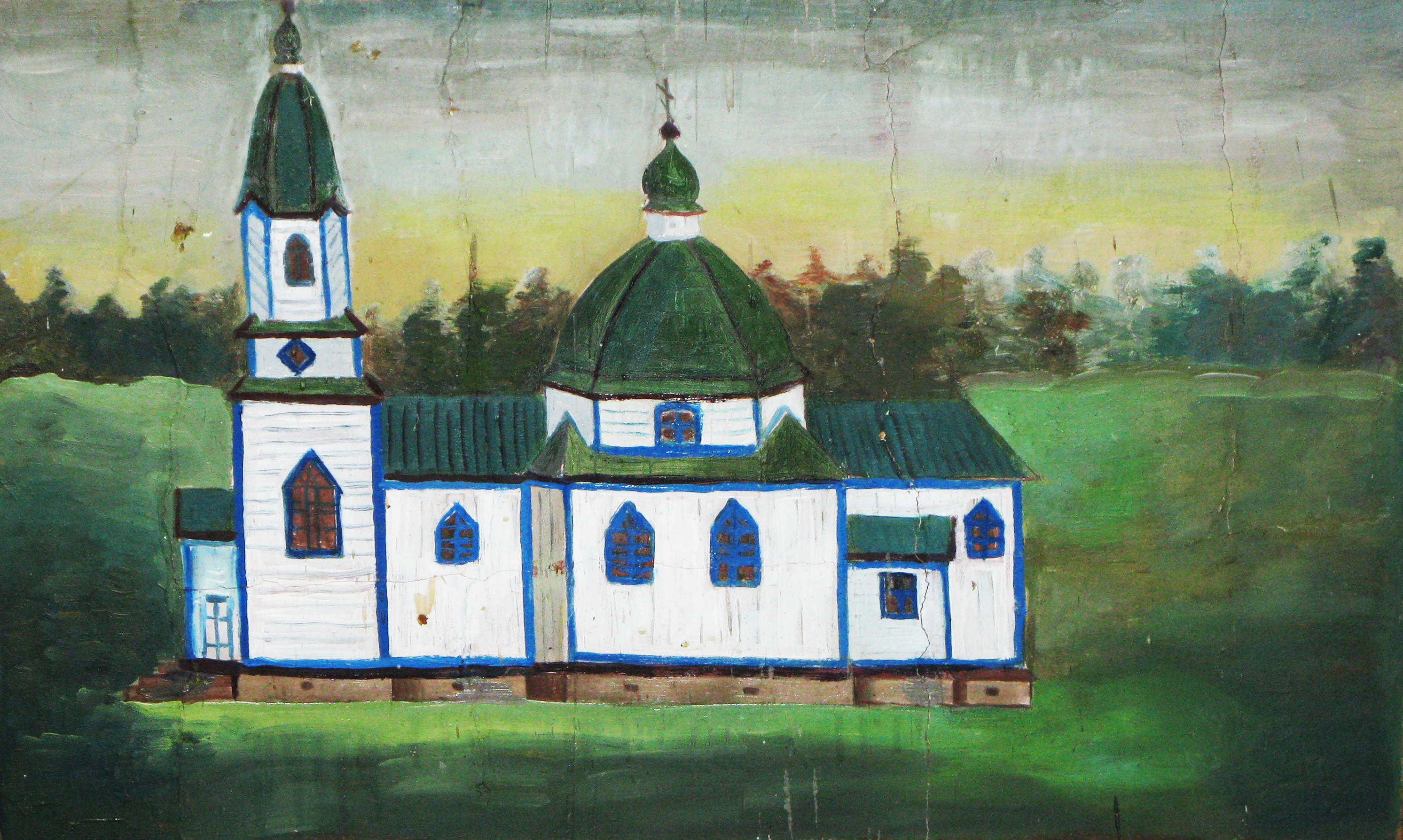 Малюнок церкви